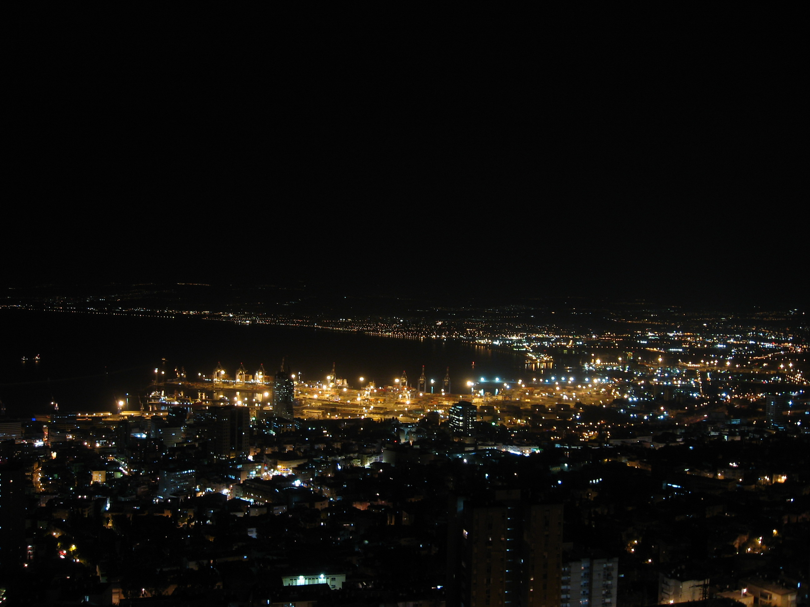 Nächtlicher Blick über die Bucht von Haifa